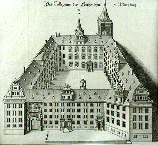 Alte Universität Würzburg („Das Collegium der Hochenschuel zu Würtzburg“). Old engraving, 28 x 30 cm.